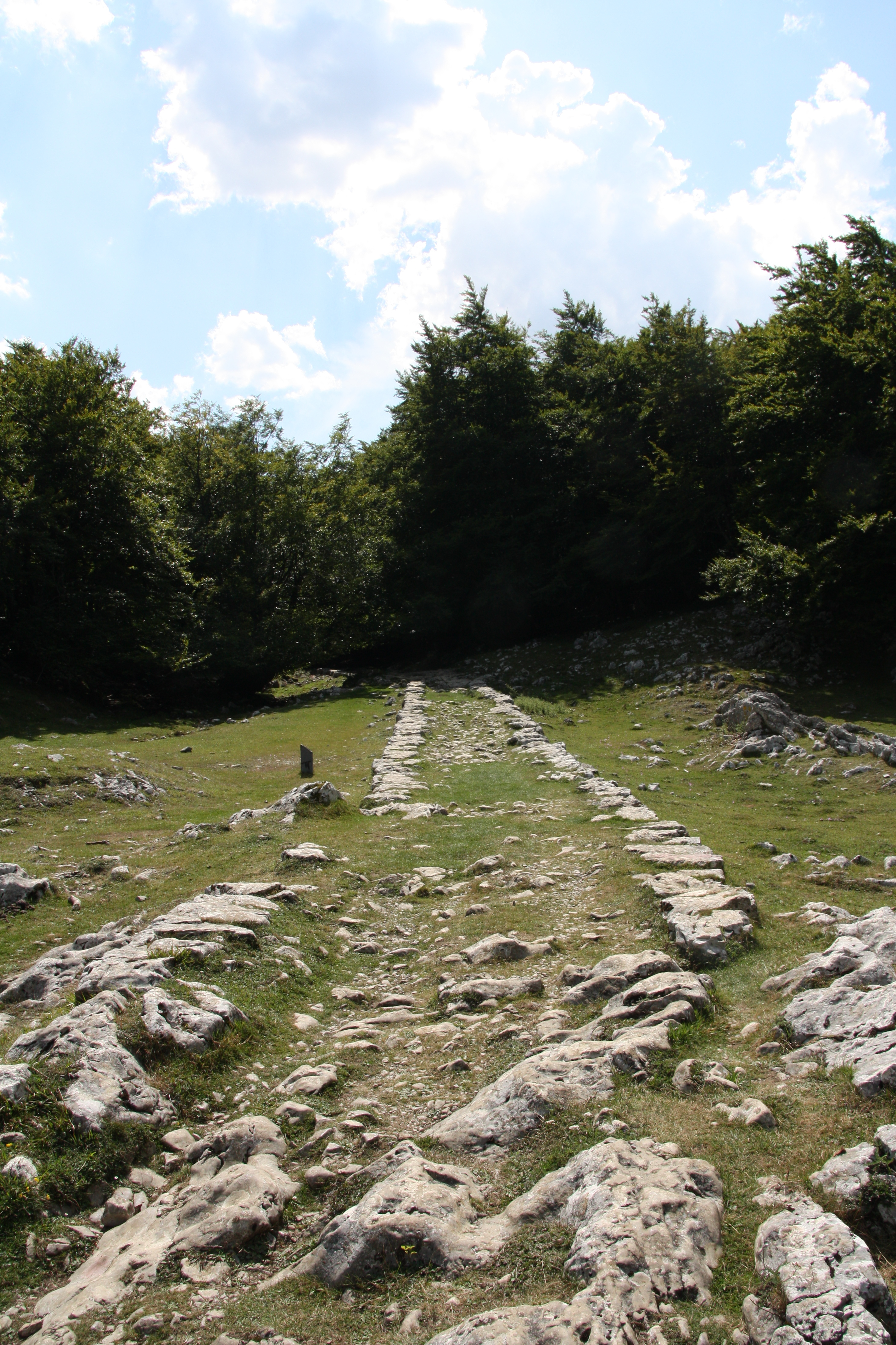 Antzinako Erromatar eta Erdi Aroko galtzada Aizkorri mendilerroan. Gipuzkoa, Euskal Herria. - Ancient Roman and Medieval road in Aizkorri mountains. Gipuzkoa, Basque Country.